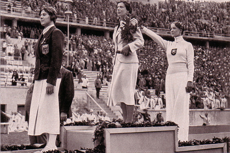 Elek Ilona a berlini (1936) olimpia bajnoka az eredményhirdetésen, kezében az ajándék tölgyfacsemetével. 1: Elek Ilona (HUN) 2: Helene Mayer (GER) 3:Ellen Müller-Preis (AUS)